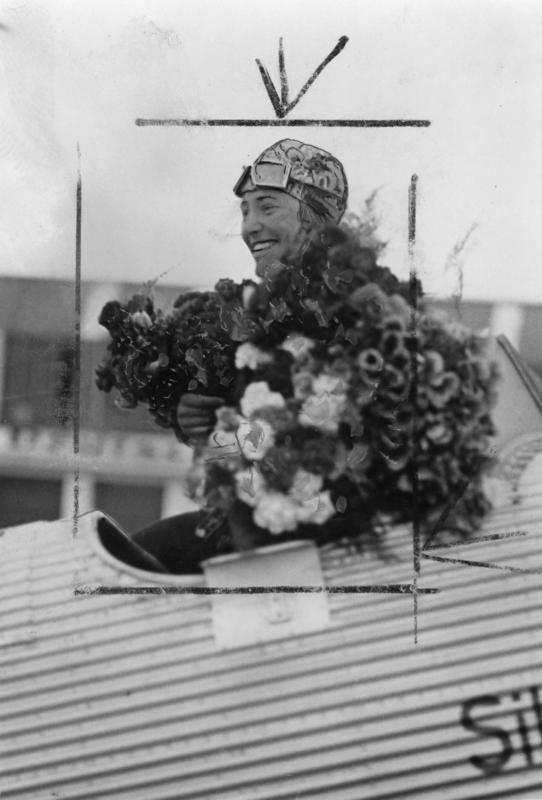 Berlin-Tempelhof, Marga v. Etzdorf Marga von Etzdorf mit dem Flugzeug Tempelhof 22019-32 [Berlin.- Marga von Etzdorf mit Blumenstrauß in ihrem Flugzeug (Junkers A 50 ce "Junior"?) auf dem Flughafen Tempelhof] Abgebildete Personen: Etzdorf, Marga von: 1907-1933; Kunstfliegerin, Deutschland (GND 12355800X)